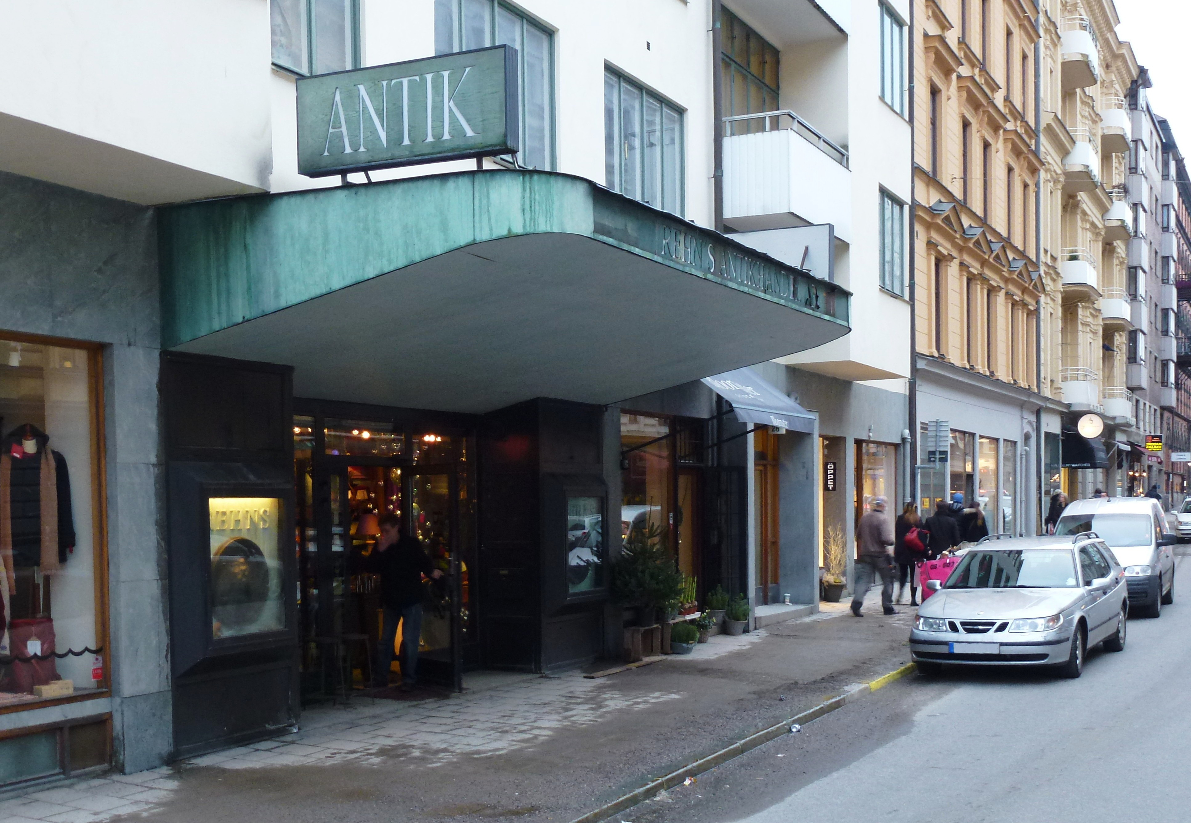 Före detta biografen "Puck" Sibyllegatan